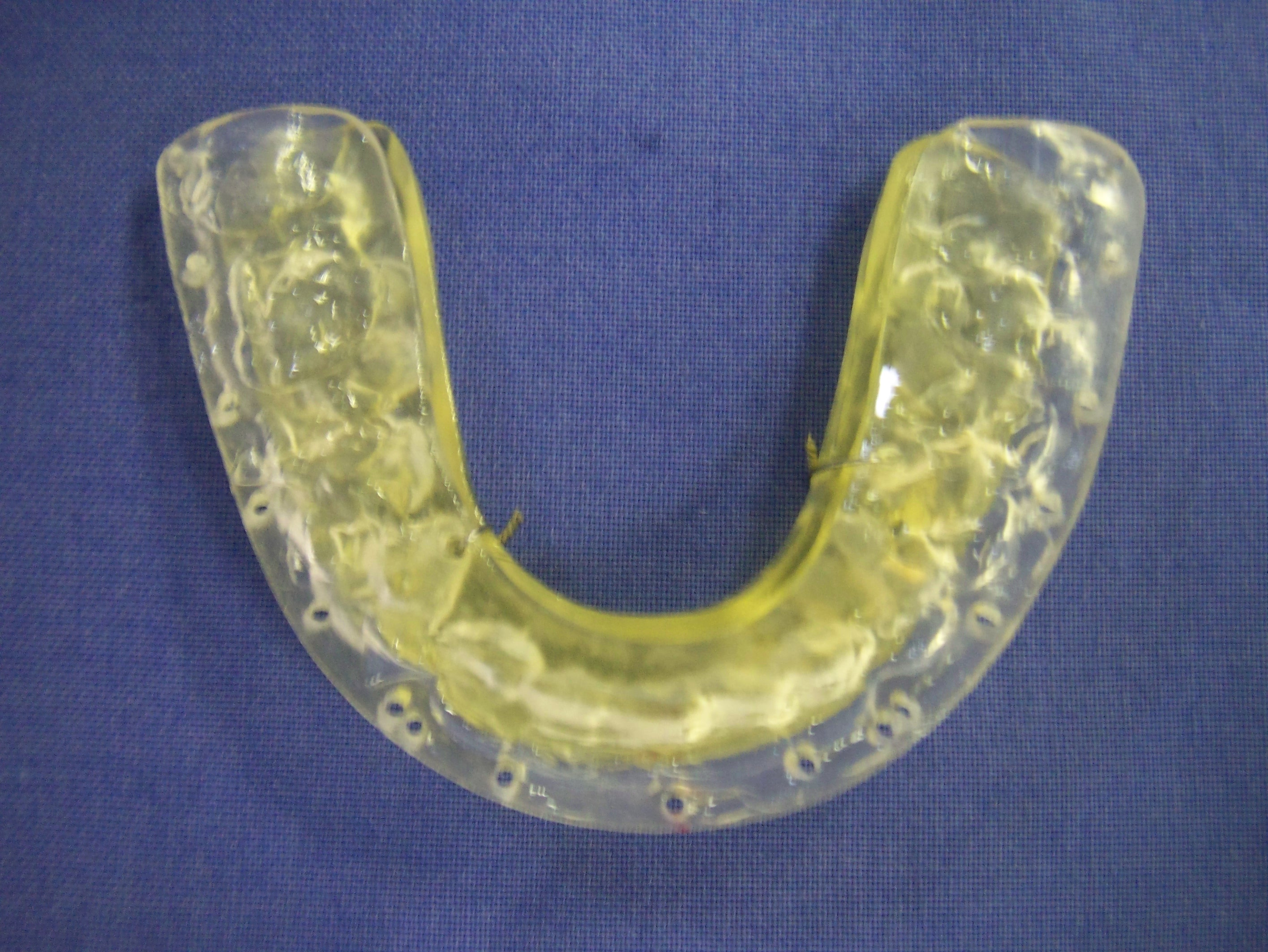 Sandwichsplint